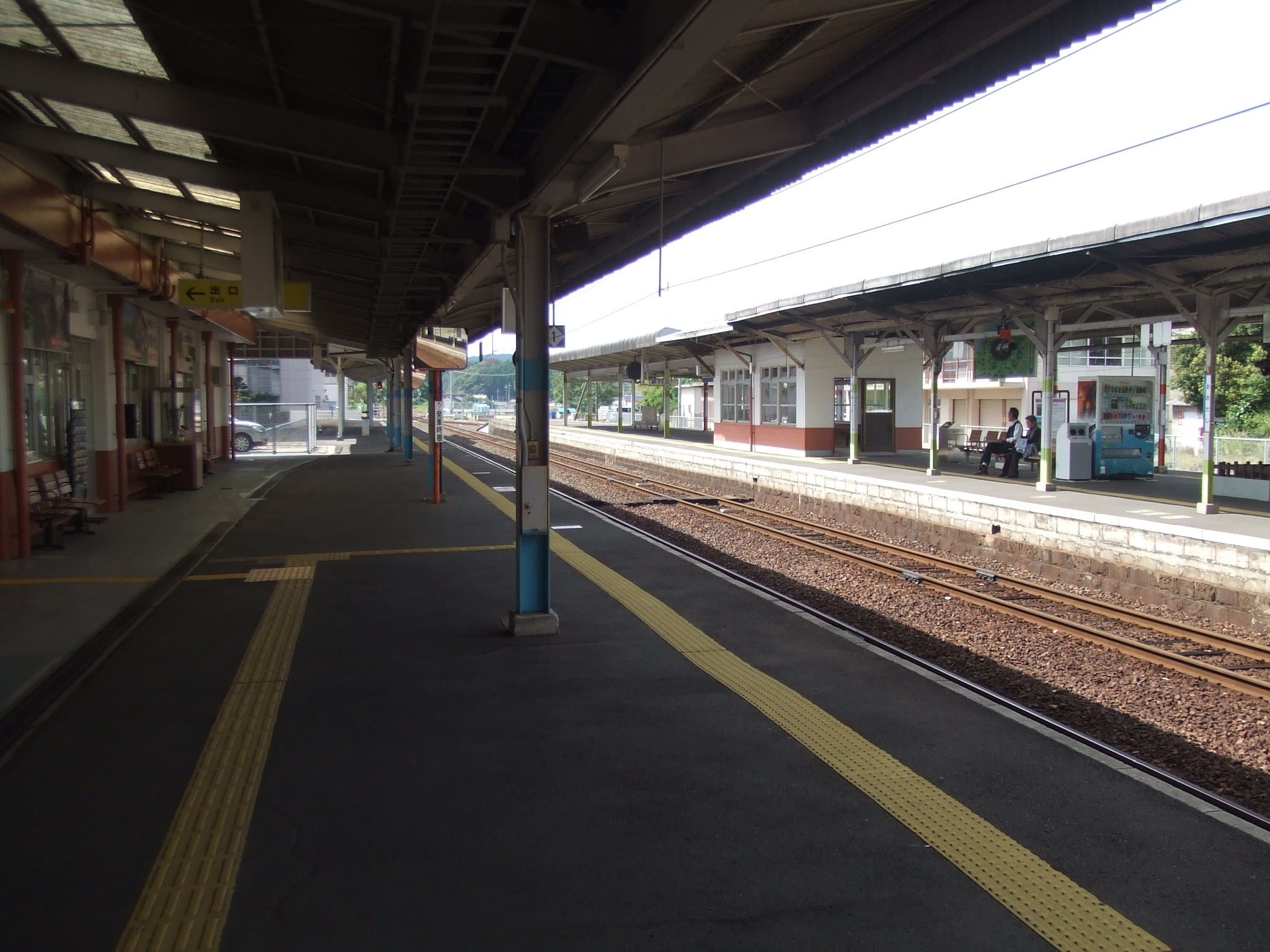 大田市駅 駅構内の様子